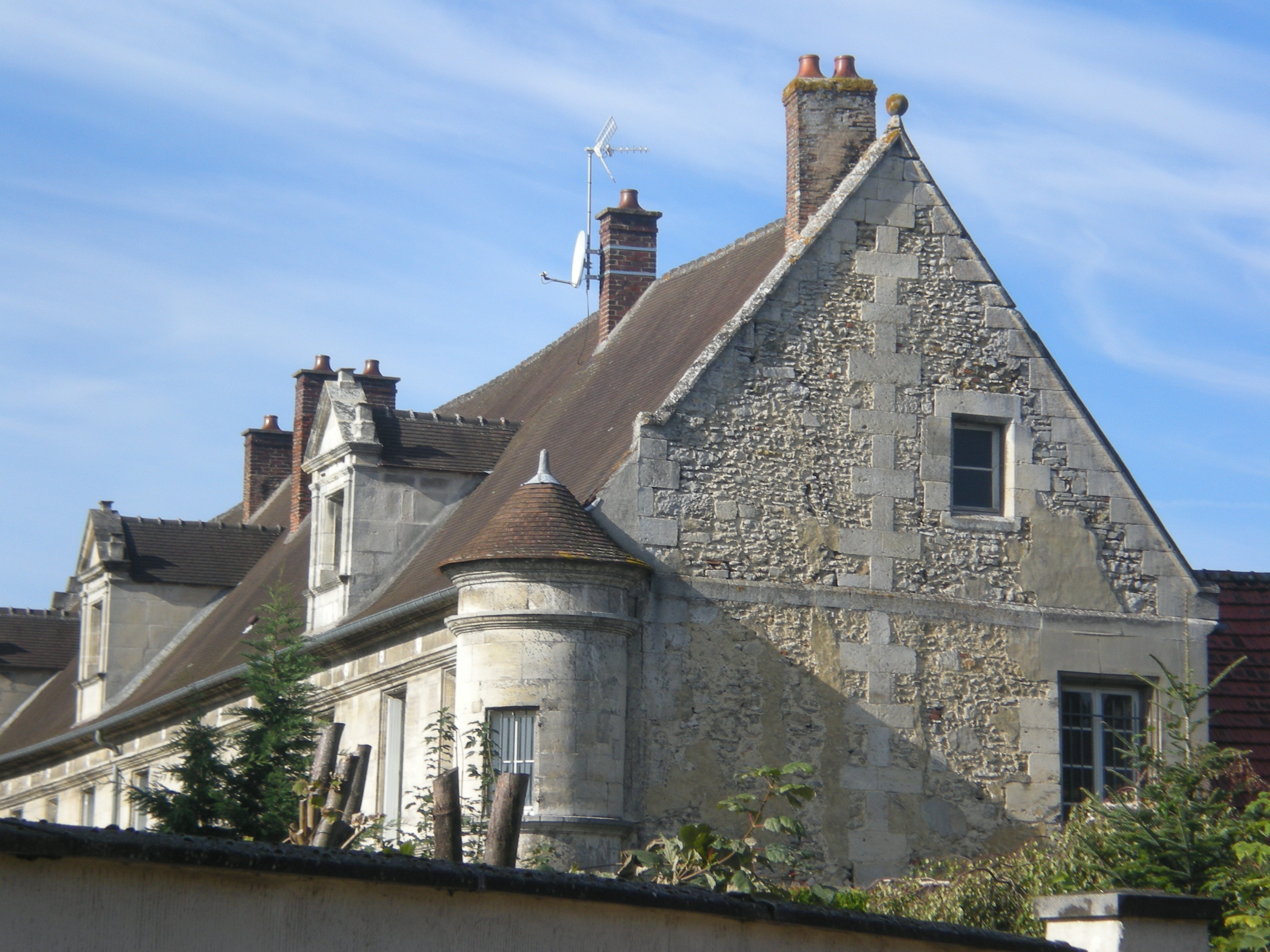 La sous-préfecture depuis la rue des Finets, à Clermont (Oise).